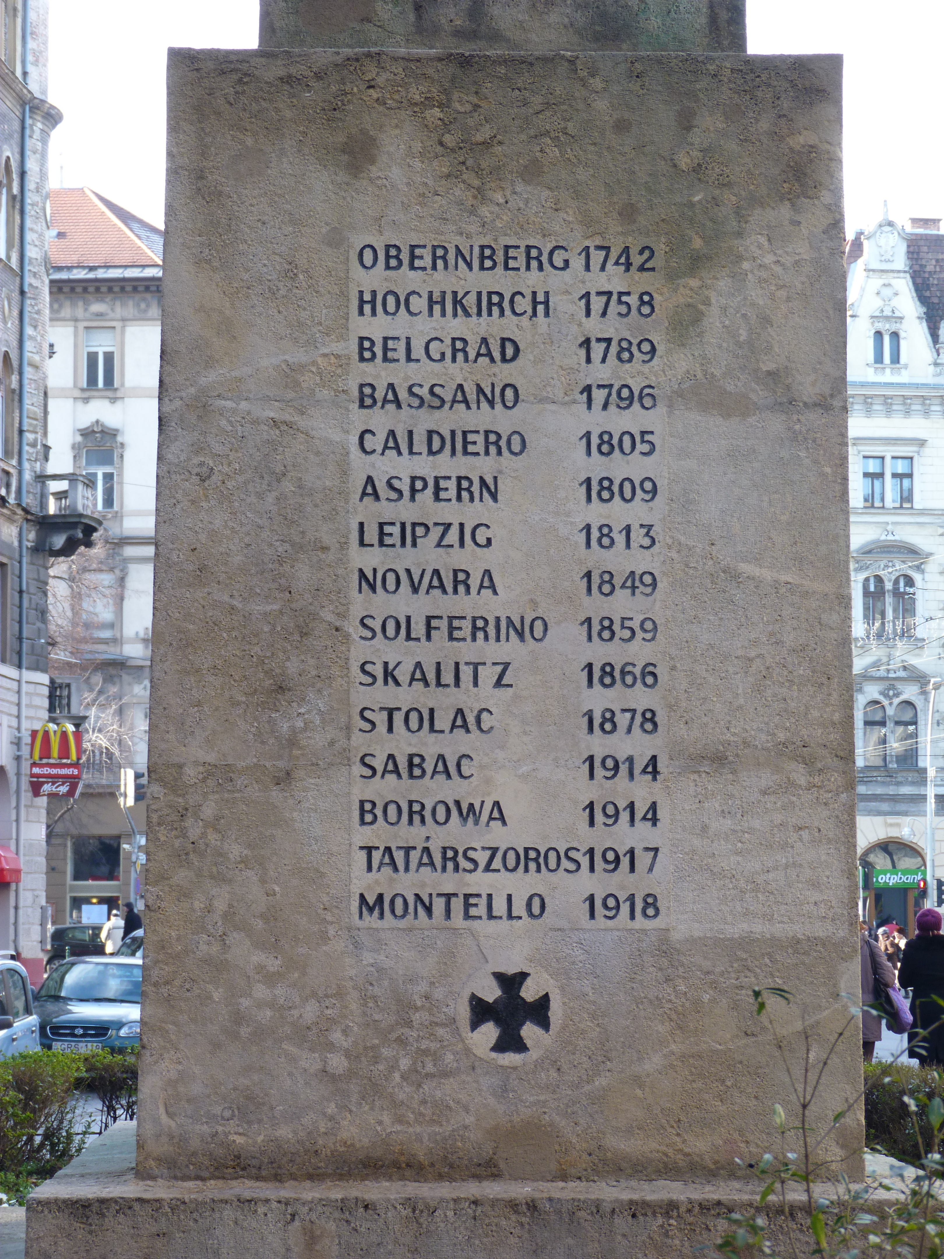 32 –es Mária Terézia Budapesti Háziezred 1741 – 1918 A fekvételek 2012. December 5- én készültek Budapesten, a 32 –esek terén. Vitam et Sanguinem ! Obernberg 1742, Hochkirk 1758, Belgrád 1789, Bassano 1796, Caldiero 1805, Aspern 1809, Leipzig 1813, Novara 1849, Solferino 1859, Skalitz 1866, Stolac 1878, Sabac 1914, Borowa 1914, Tatárszoros 1917, Montello 1918